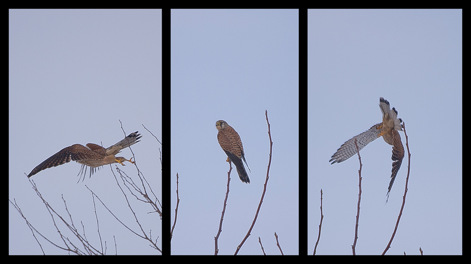 Ястреб Мишелов заснет в района на село Стефан Стамболово